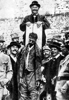 L'esecuzione di Cesare Battisti